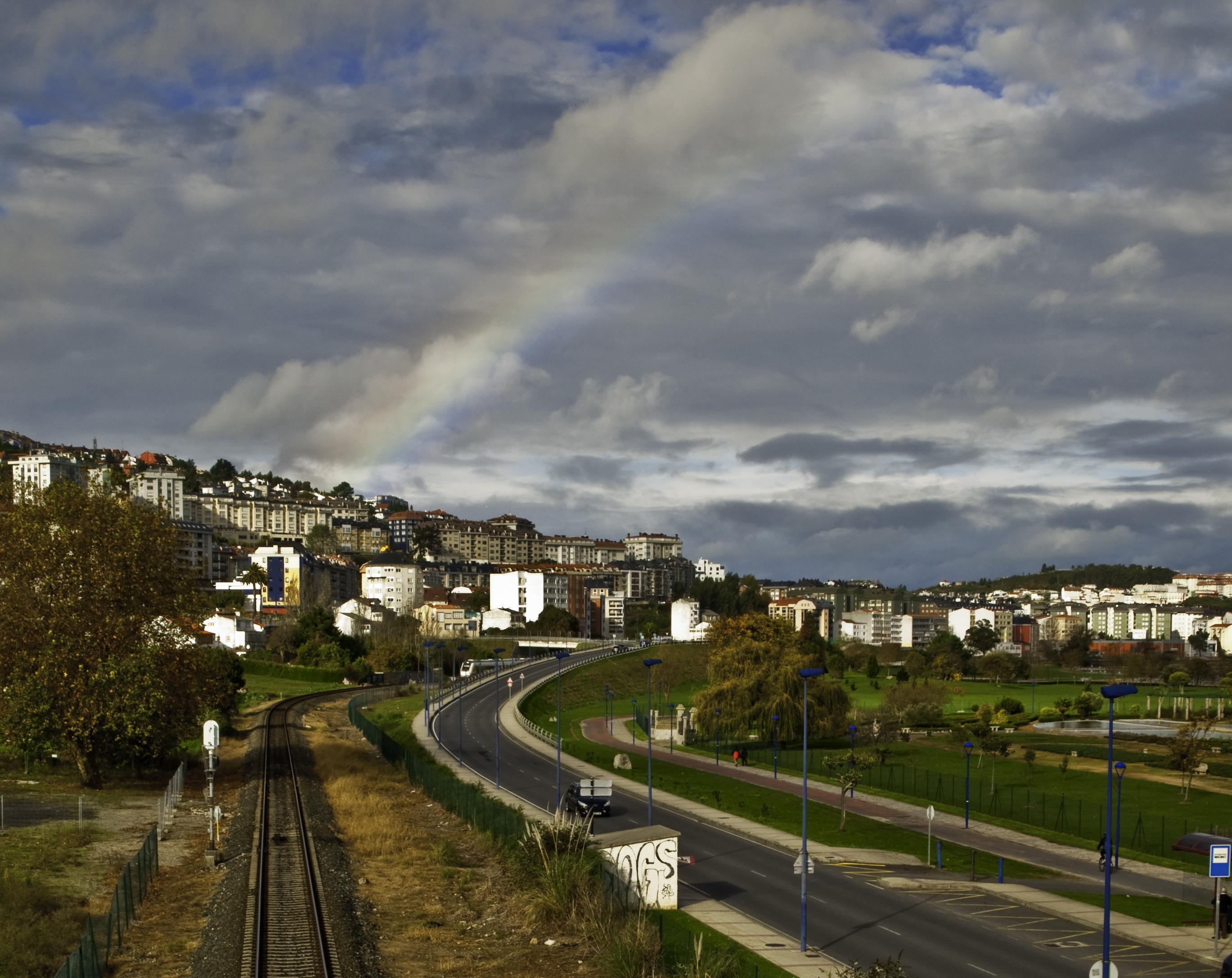 Culleredo, La Coruña, Galicia, España